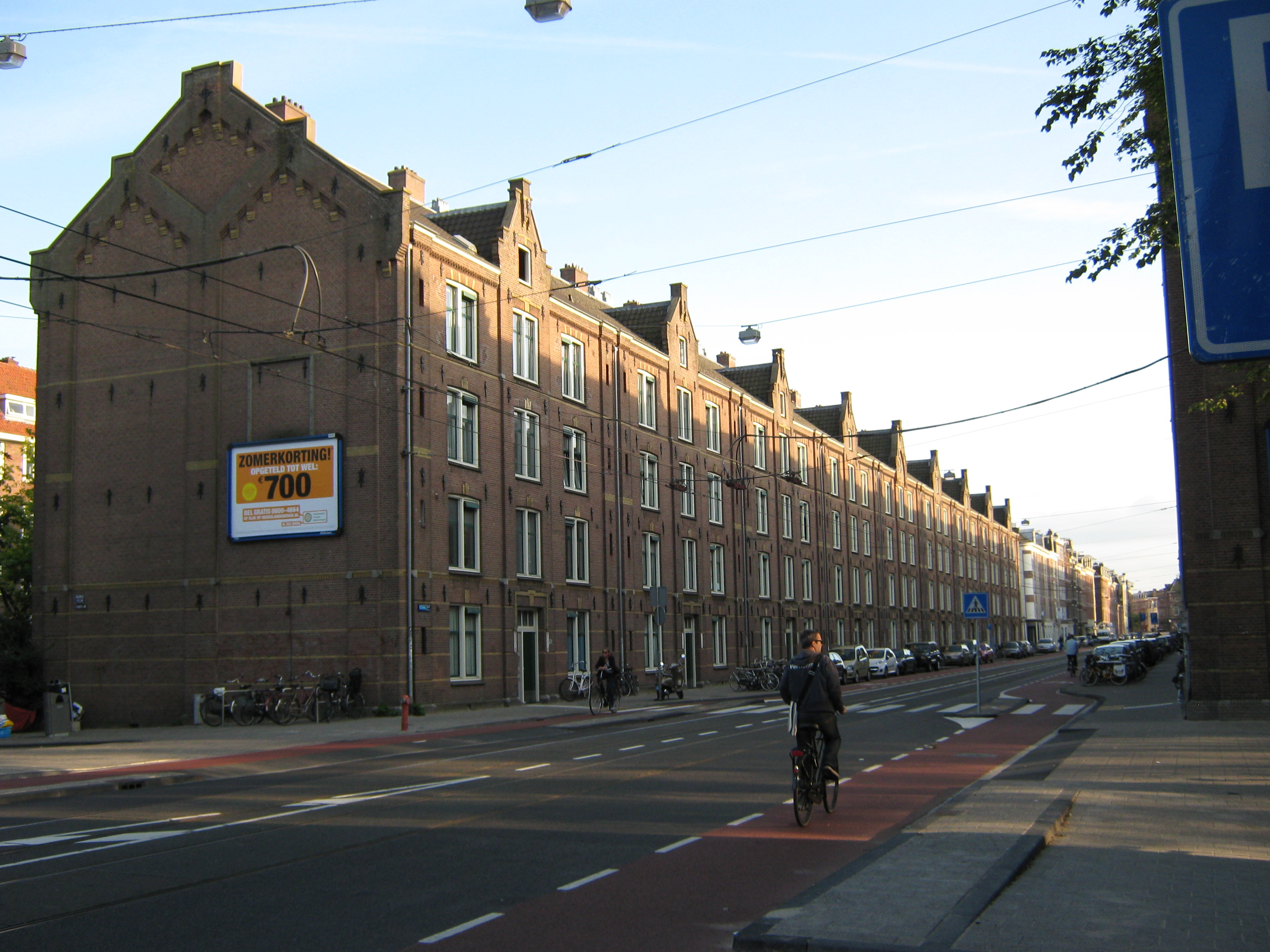 Arbeiderswoningen Marnixstraat 215-231, Amsterdam gebouwd door de Amsterdamsche Vereeniging tot het bouwen van Arbeiderswoningen, architect Bastiaan de Greef 1876/ 1878